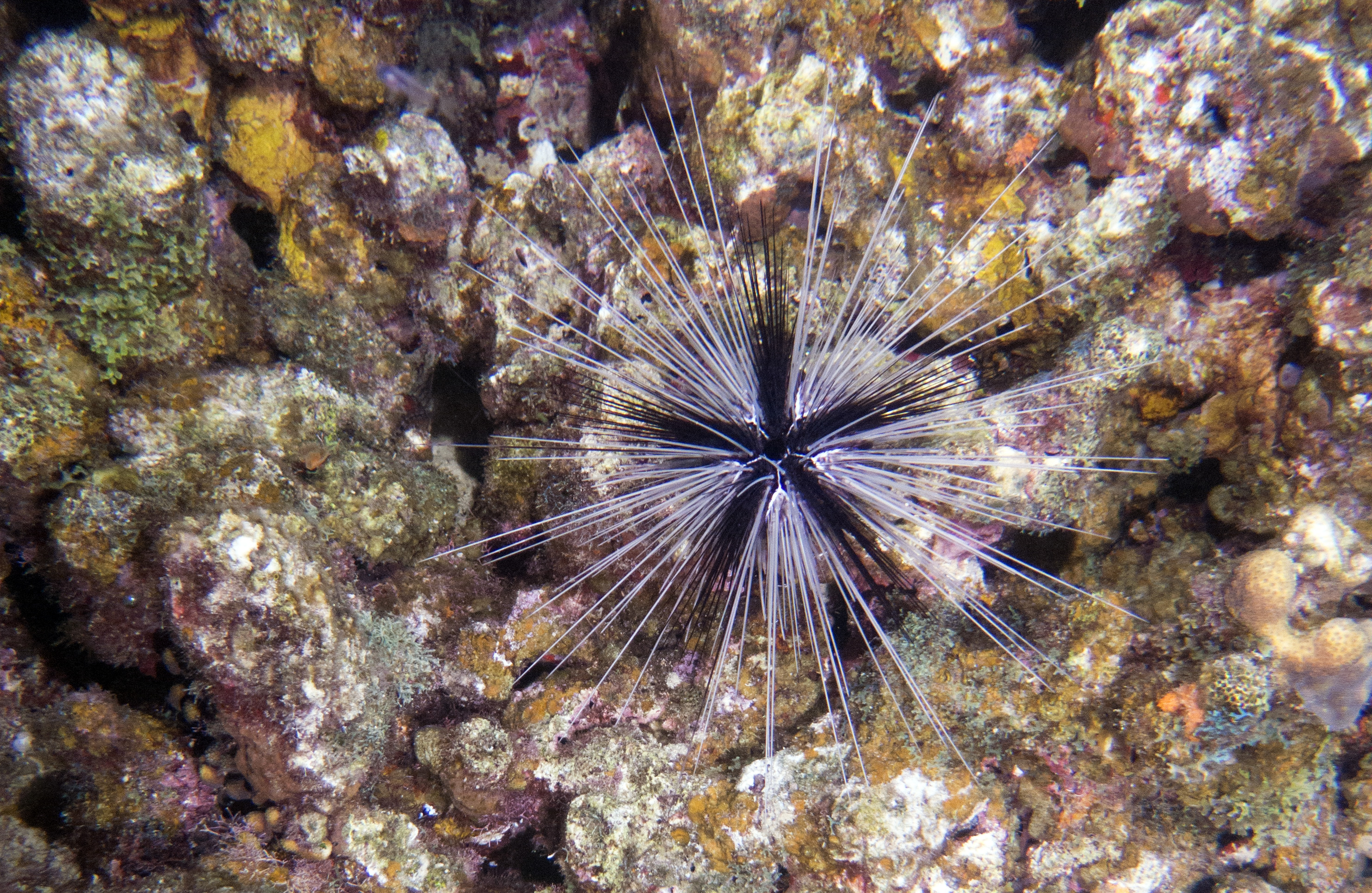 Diadema antillarum.